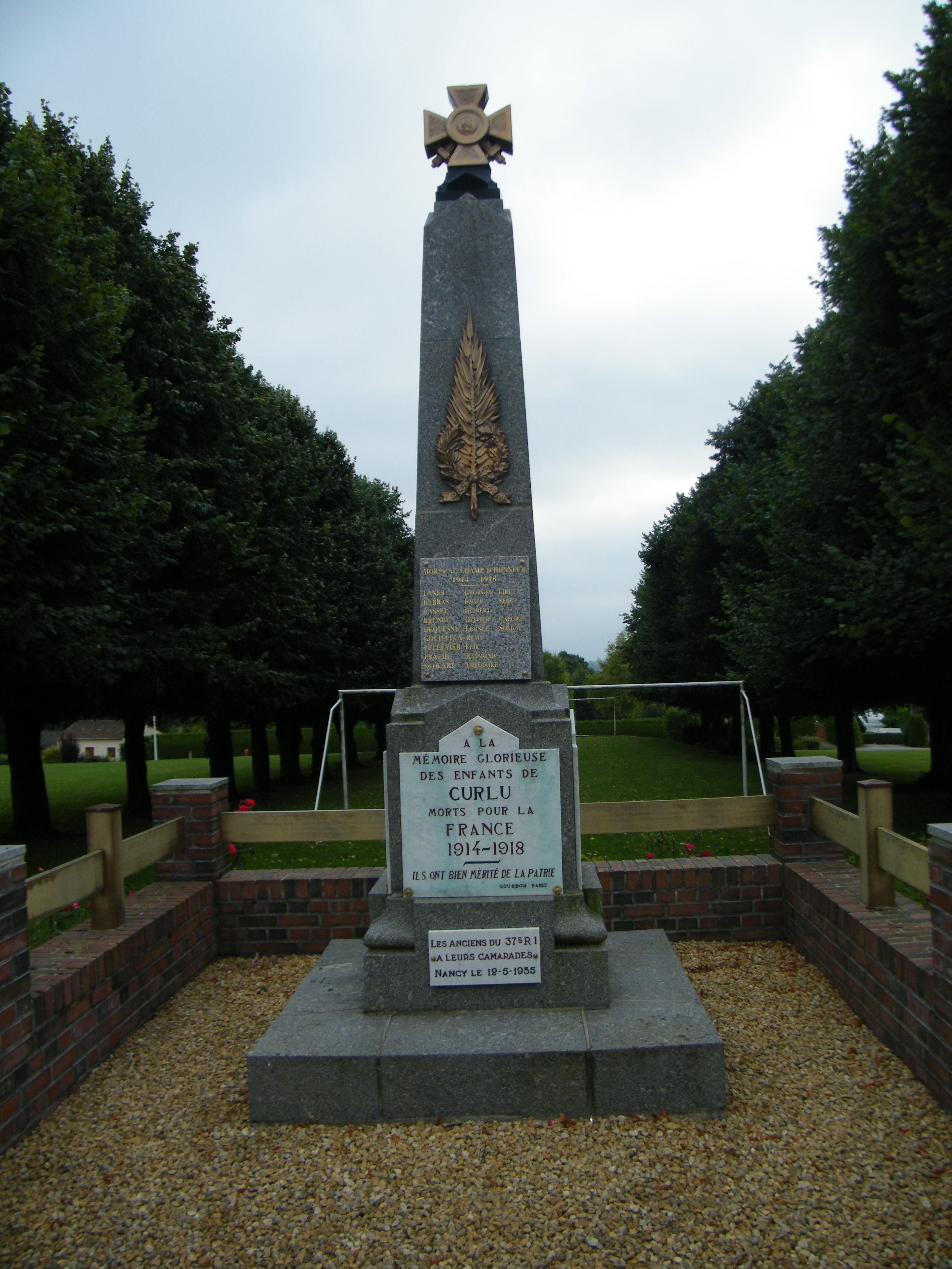 Monument aux morts pour la patrie.